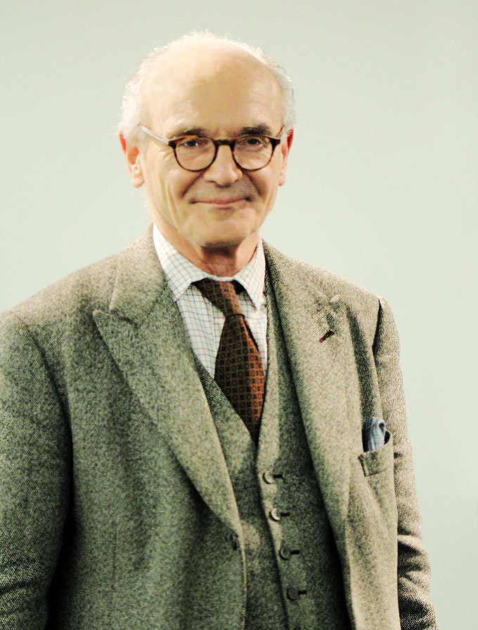 Martin Mosebach, Heine Haus – Düsseldorf, 05.Februar 2014 Lesung aus "„Das Blutbuchenfest“